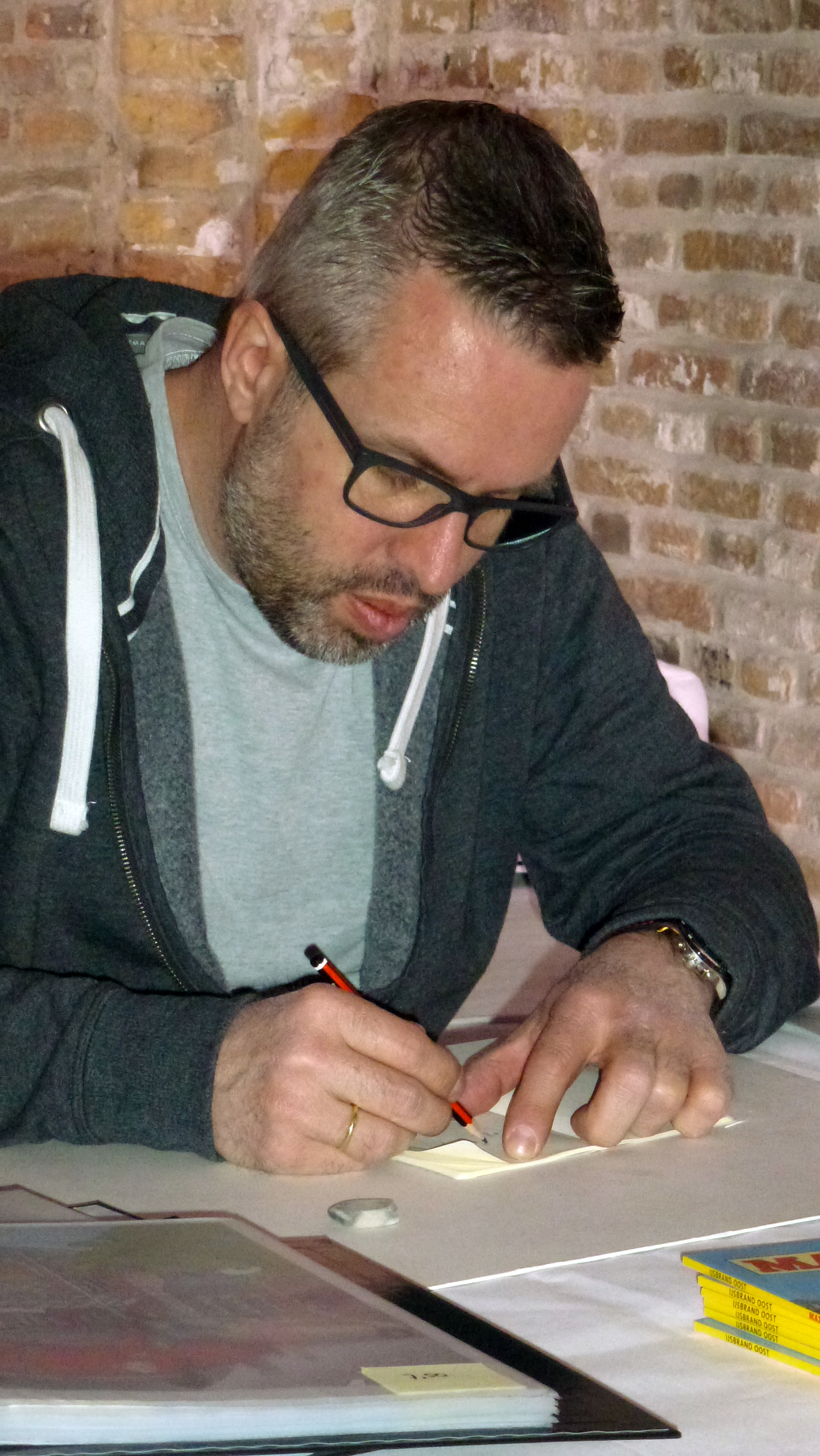 IJsbrand Oost (1968) striptekenaar en illustrator van o.a. de strip Max Miller van het Eppo stripblad (2009-heden). Opleiding aan de Hanzehogechool Groningen.De foto is genomen tijdens het evenement Strips op de Markt 2016 Gouda NL. Zijn woonplaats is Assen.